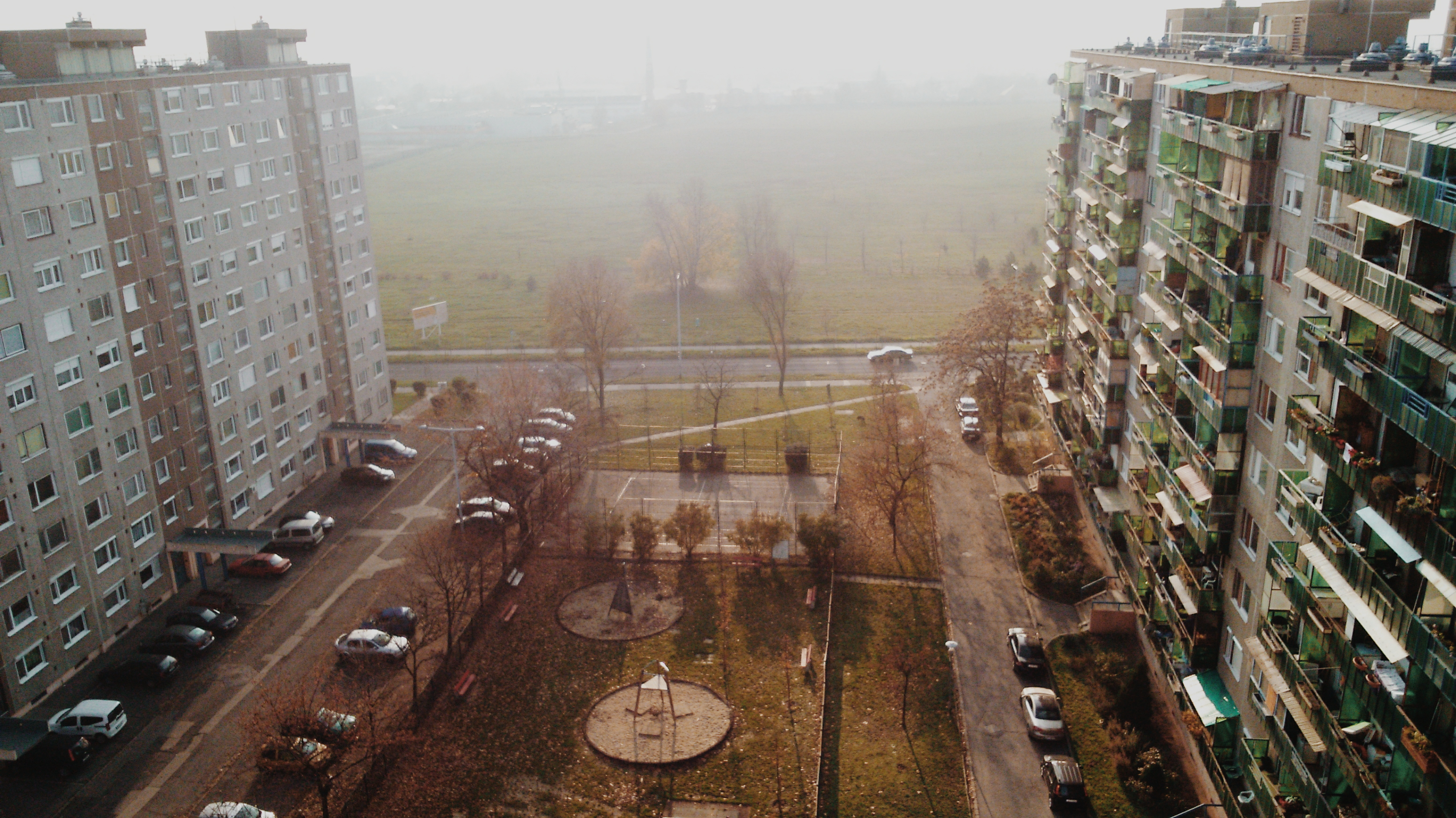 Lakótelep a Harmat utcában és a Gergely-bánya (Budapest, Kőbánya-Óhegy, X. ker.)